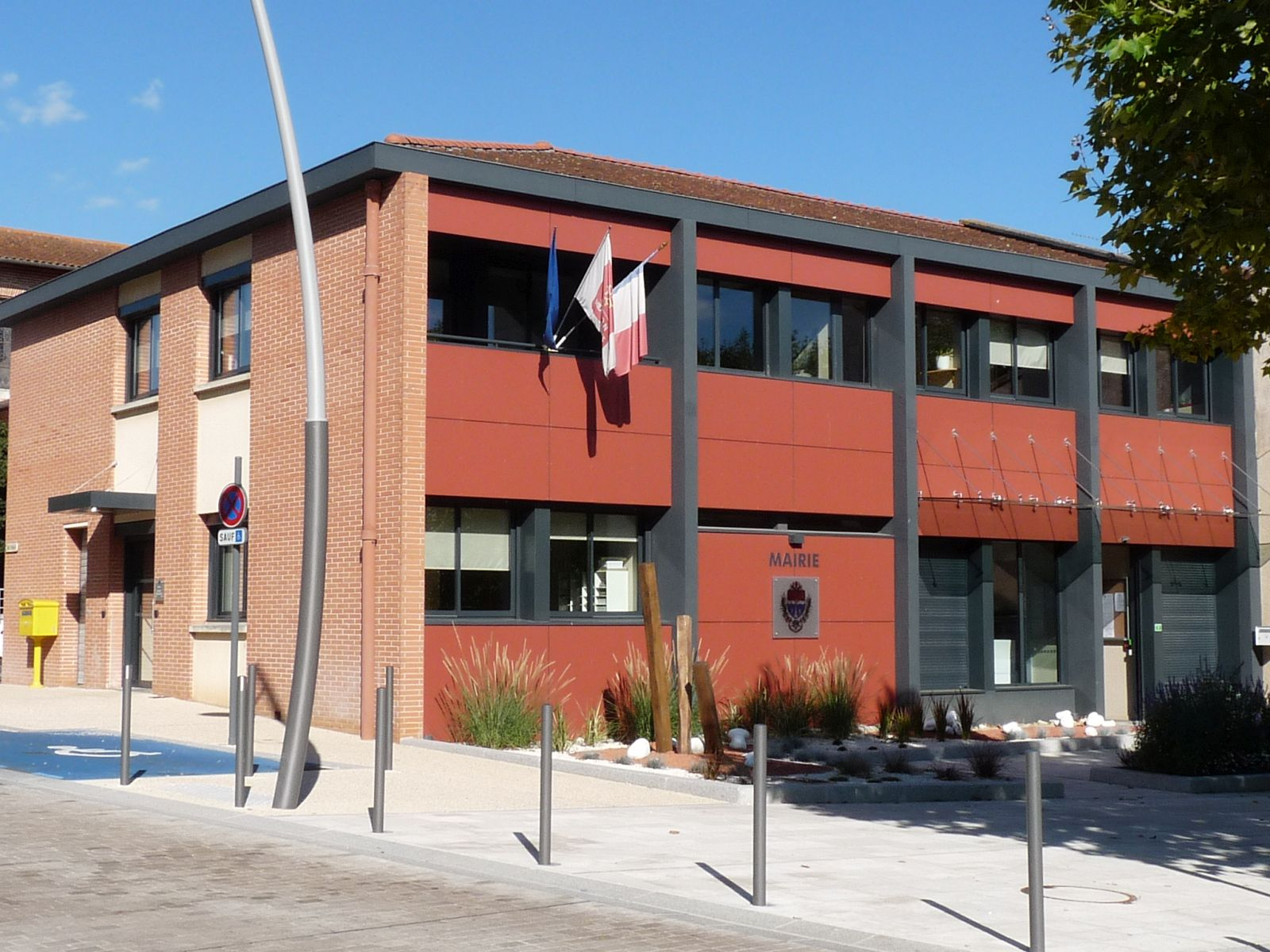 Mairie de Roques, Haute-Garonne, France